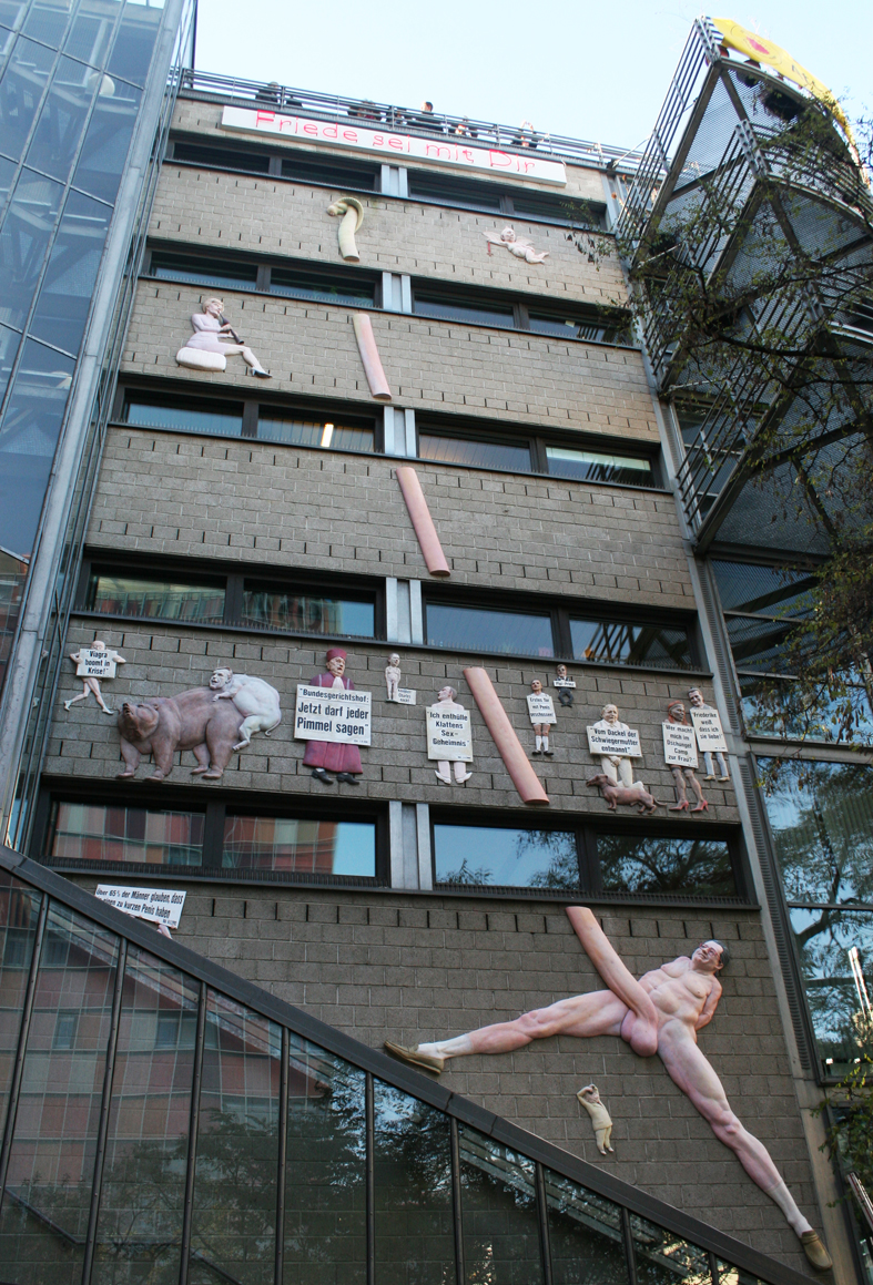 Relief des Bildhauers Peter Lenk am TAZ-Gebäude in Berlin